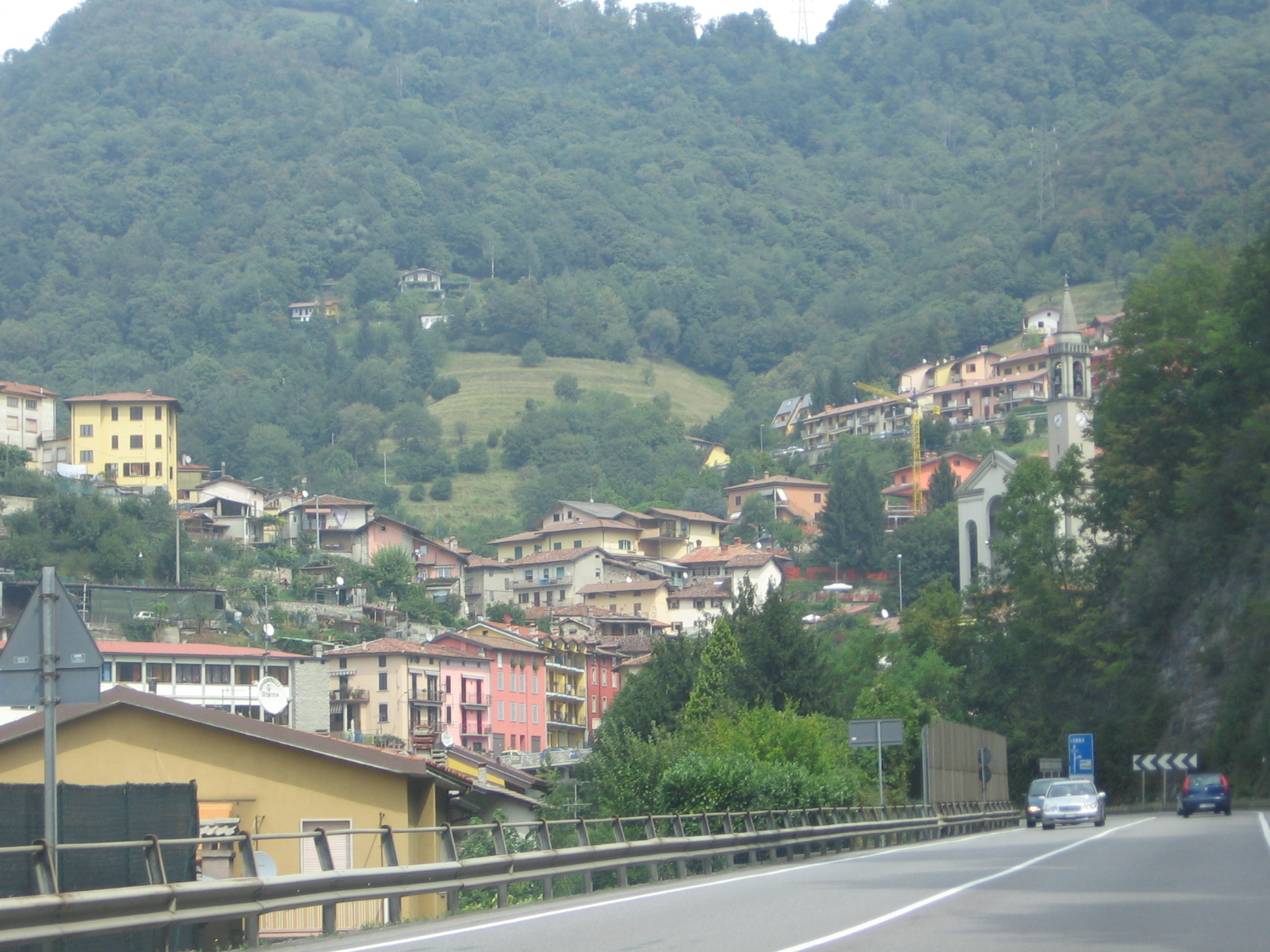 Botta di Sedrina, Bergamo, Italiy